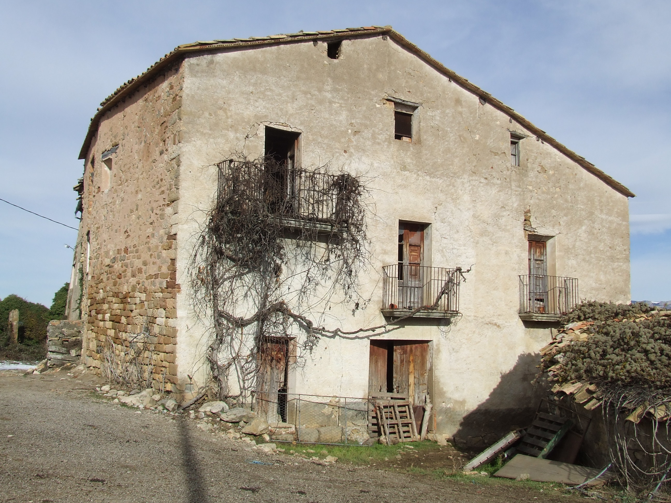 Casa Ventureta, amb la capella de Sant Joan Baptista (Perolet, Sant Salvador de Toló, Pallars Jussà)